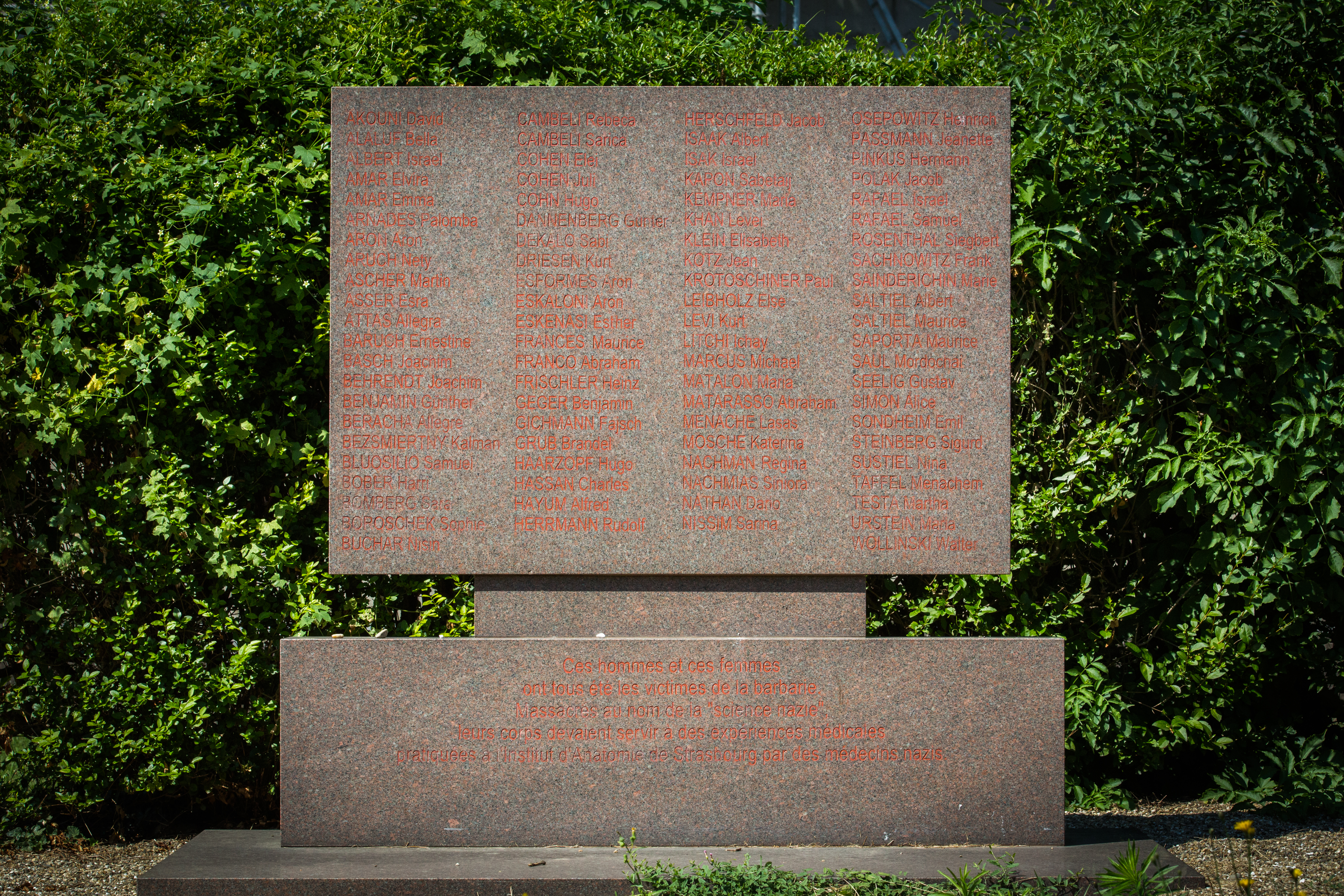 Monument à la mémoire des victimes de la Shoah. La liste des noms des 86 Juifs gazés au camp du Struthof par le professeur en médecine nazi Hirt.